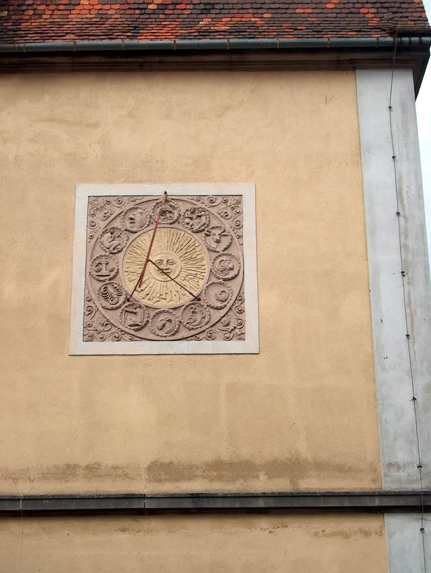 Lwówek Ślaski – Zegar słoneczny.